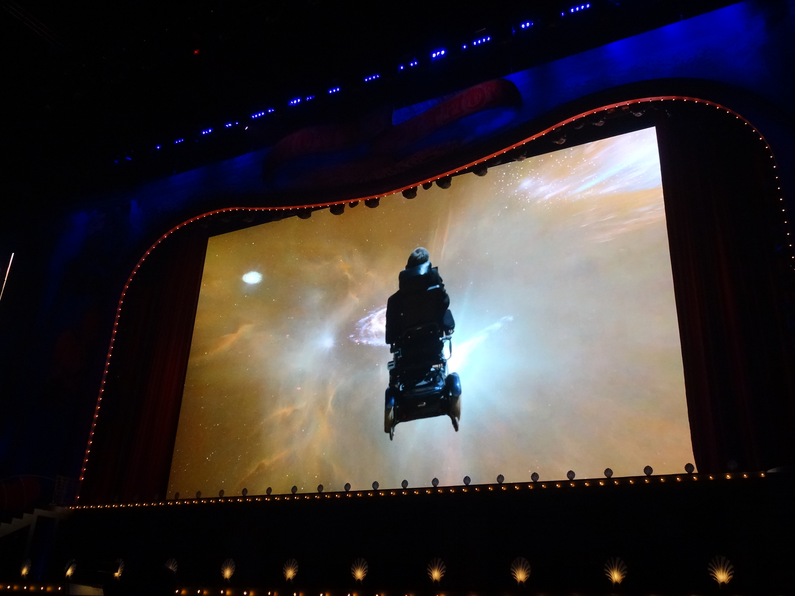 Photo 02-07-14 12 55 10